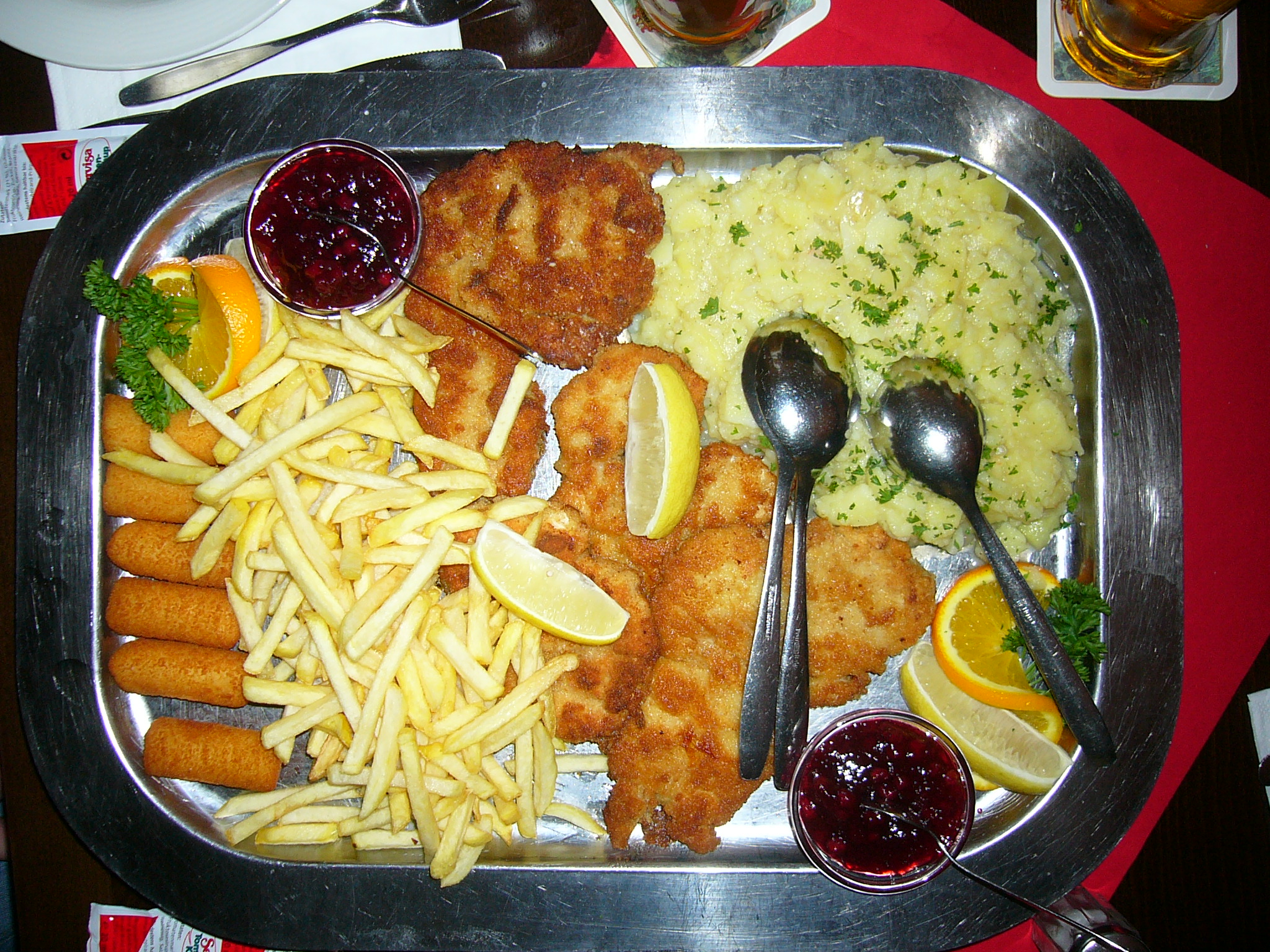 Großer Schnitzelteller, serviert in einer Gaststätte in Bad Birnbach (Bayern).